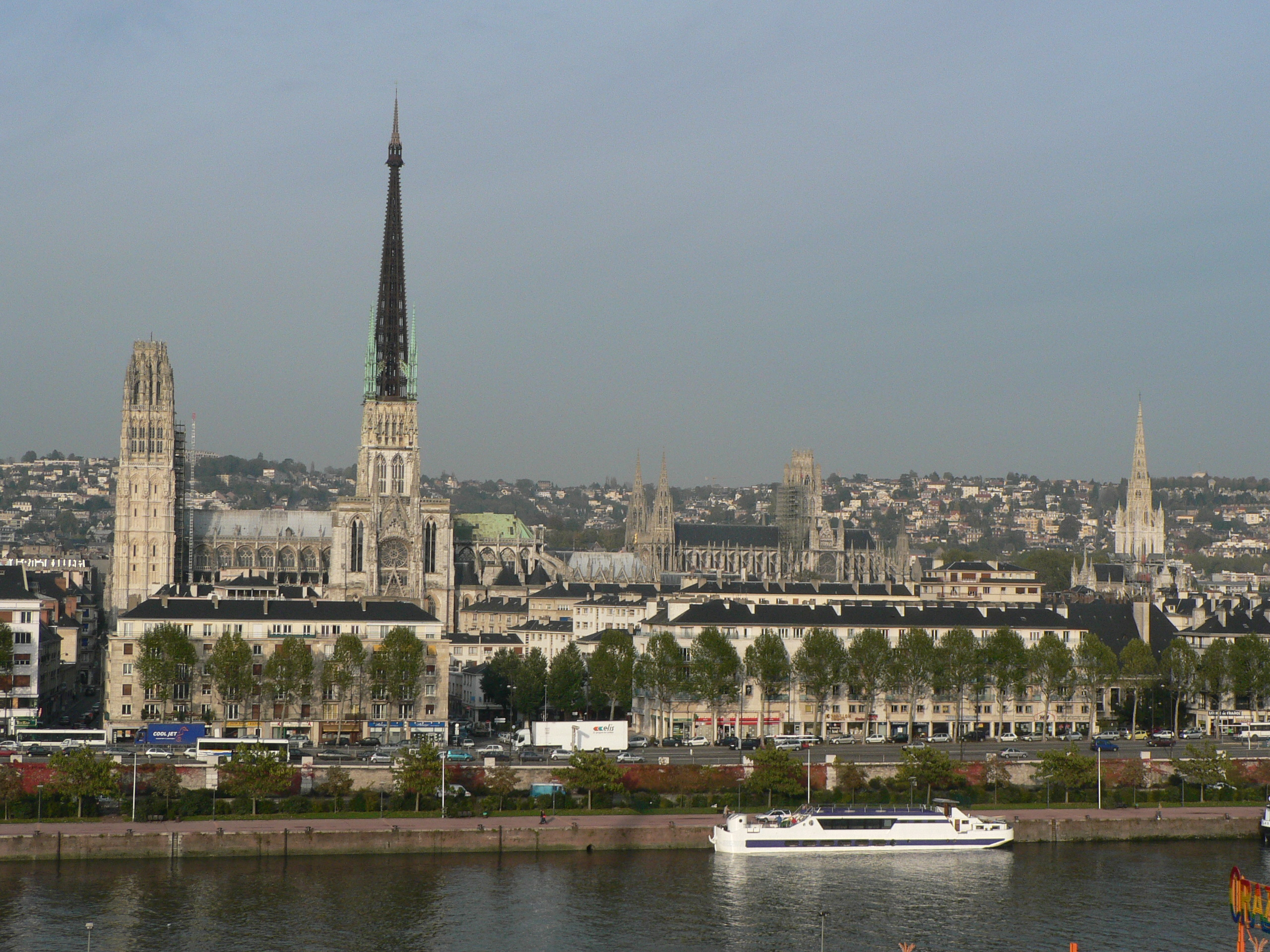 Rouen